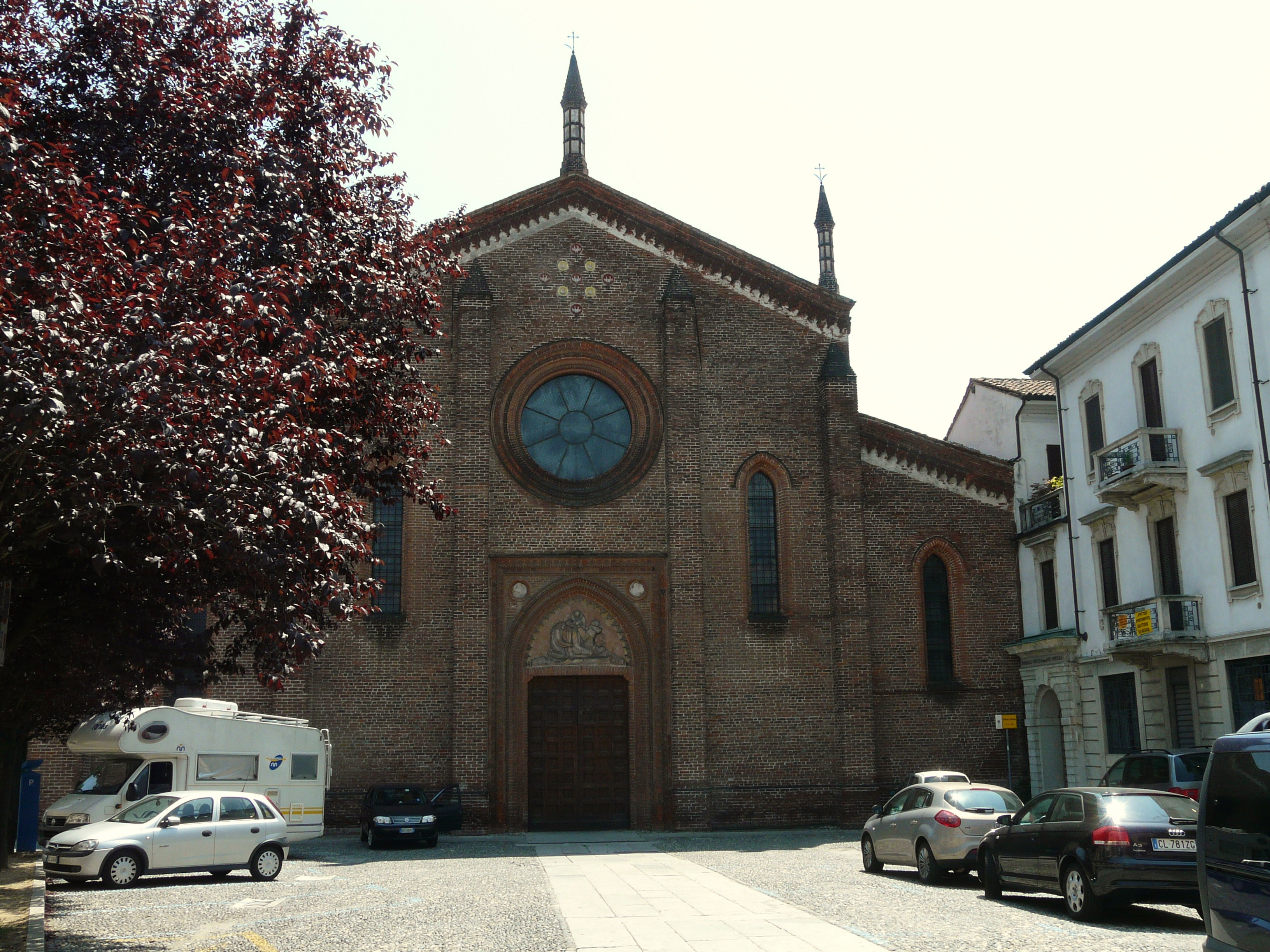 Chiesa di San Pietro Martire, Vigevano, Lombardia, Italia